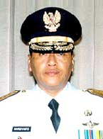 Mardiyanto sebagai Gubernur Jawa Tengah